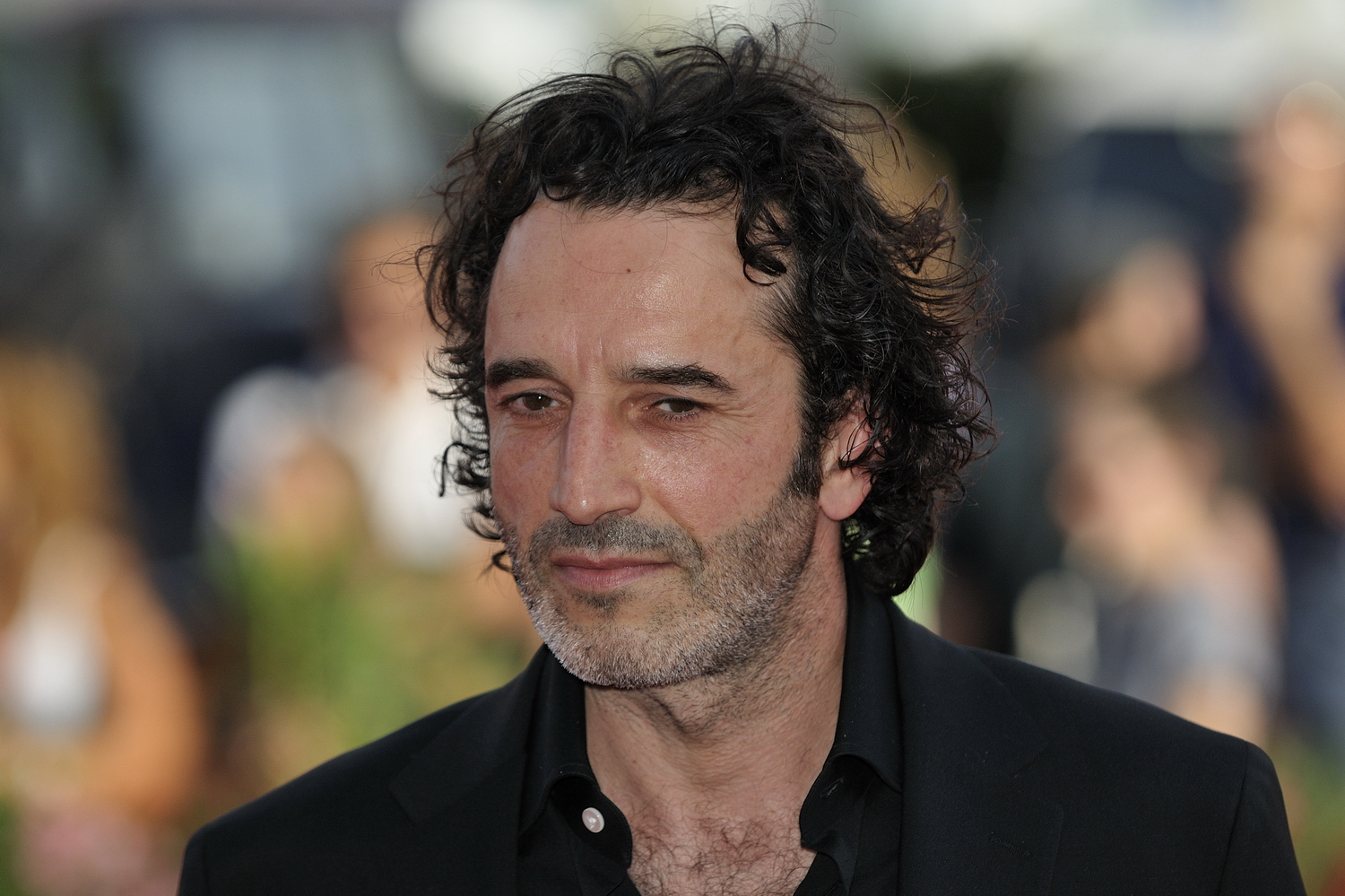 66ème Festival du Cinéma de Venise (Mostra), 3ème jour (04/09/2009) Photocall avec Bruno Todeschini pour le film : Lourdes